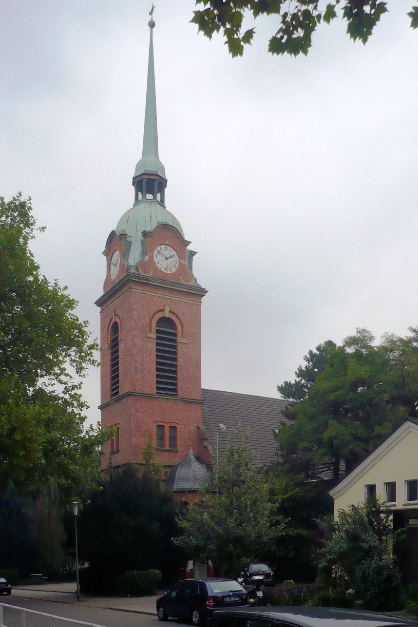 Evangelische Kirche "Alte Kirche" in Essen-Kray